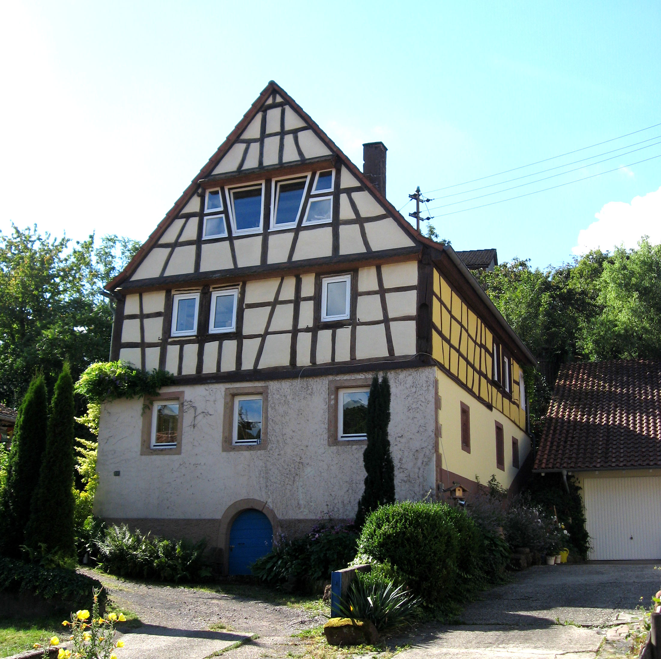 barockes Fachwerkhaus Am Volkereck 13 in Völkersweiler